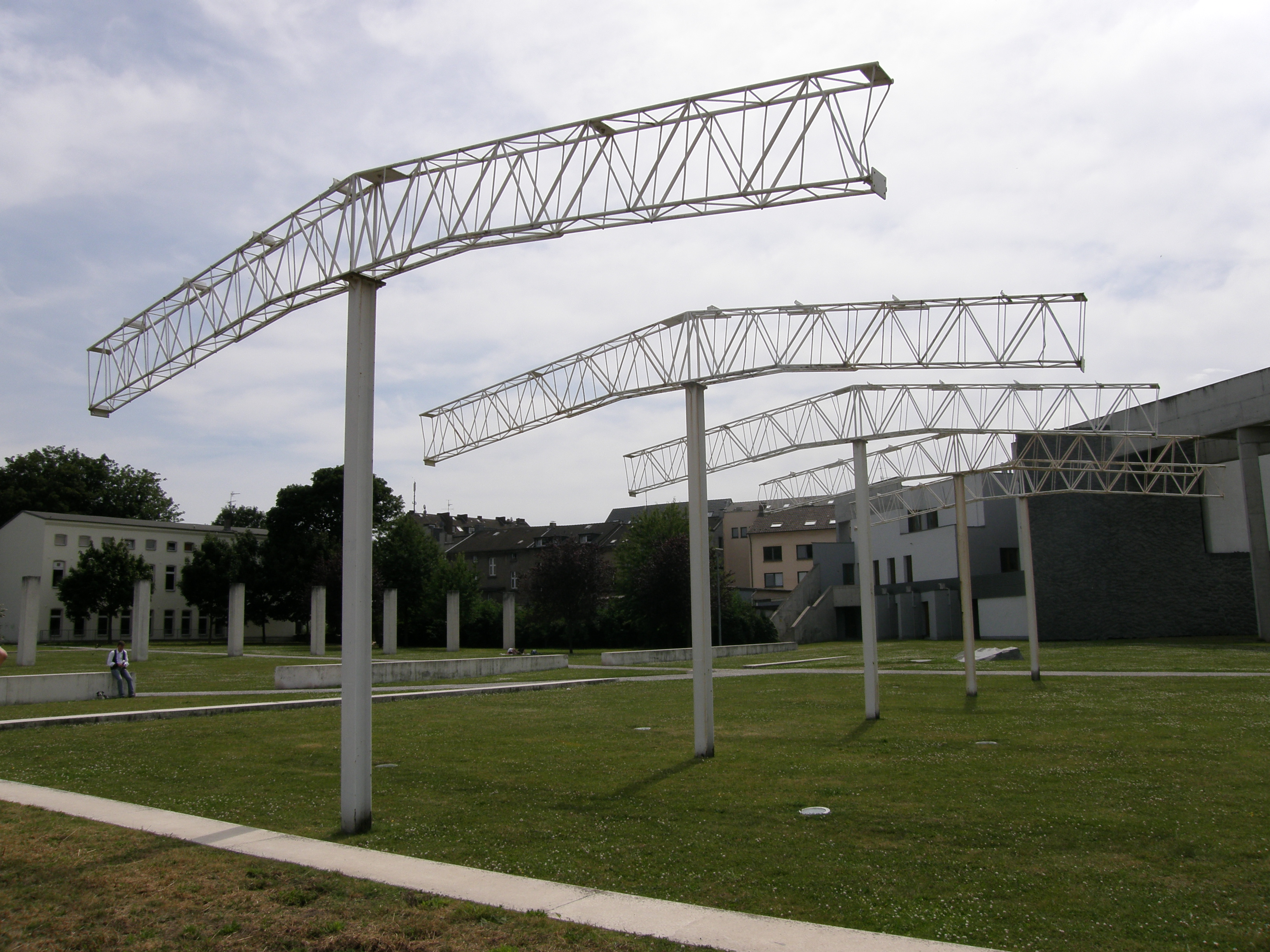 Reste der Sparzentrale im Garten der Erinnerung im Innenhafen von Duisburg